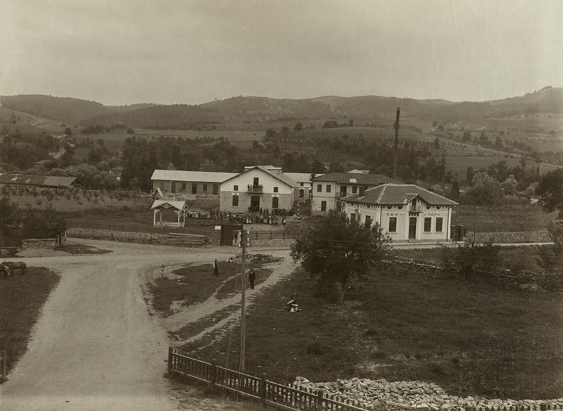 Вълнено-текстилна фабрика „Св. Георги“, на Българска търговска банка в Трявна. През 1912 г. е с основен капитал 800 000 лева и 180 работници. Фотоалбум с фотографии на български индустриални предприятия от периода 1887-1912 г., подарен от Съюза на българските индустриалци на цар Фердинанд І по случай 25-годишнината от възшествието му на българския престол.